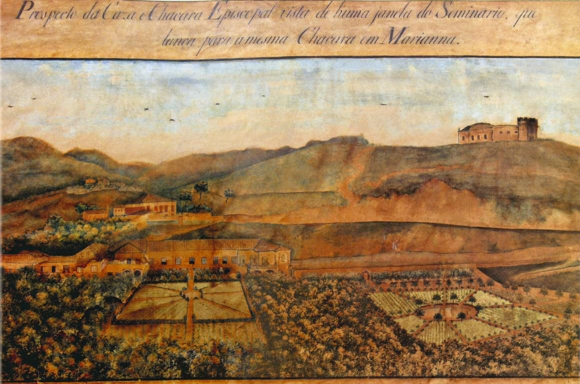 Português do Brasil: Chácara Episcopal de Mariana, entre 1801 e 1809